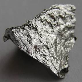 Manganese